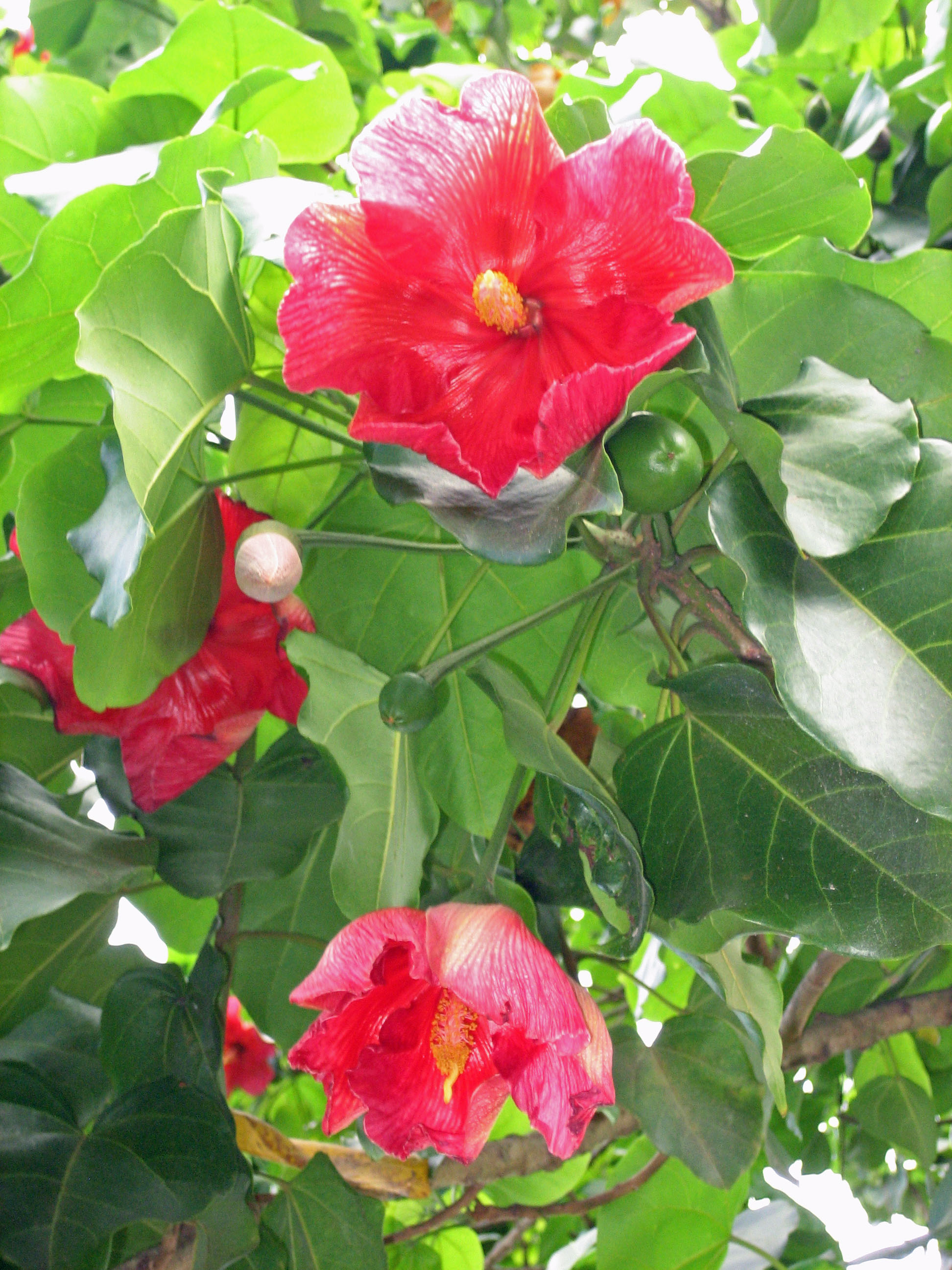 Flower of the maga tree, Thespesia grandiflora or Maga grandiflora is the national flower of Puerto Rico where is endemic. It's related to the common hibiscus. This particular tree is in front of Casa Pueblo, Adjuntas, Puerto Rico. / Flor de maga, la flor nacional de Puerto Rico, donde es considerada endemica. Es relacionada con el hibisco comun, pero contrario a este, crece como �a6418@N00/553809322/ Adjuntas, Puerto rico / Flor de maga / Thespesia grandiflora / Maga grandiflora] Uploaded by Epibase